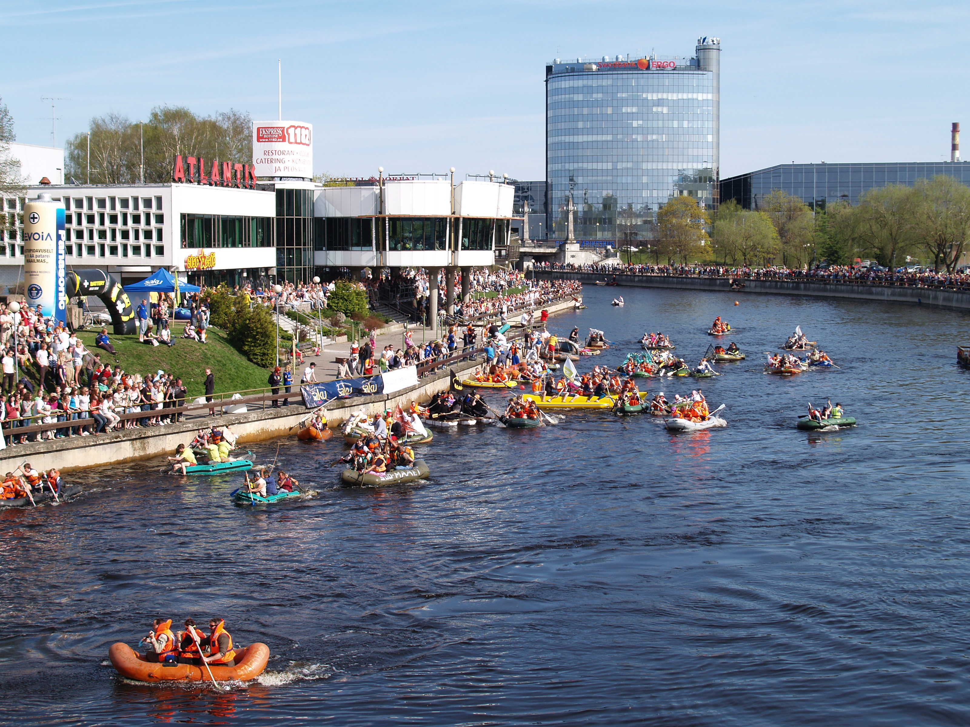 Tudengite kevadpäevad 2009. Paadiralli.